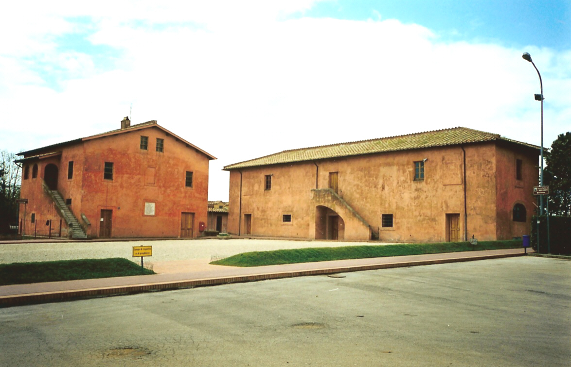 La Casa di Santa Maria Goretti, detta la "Cascina Antica" (a destra). Le Ferriere. Picture by Torvindus.